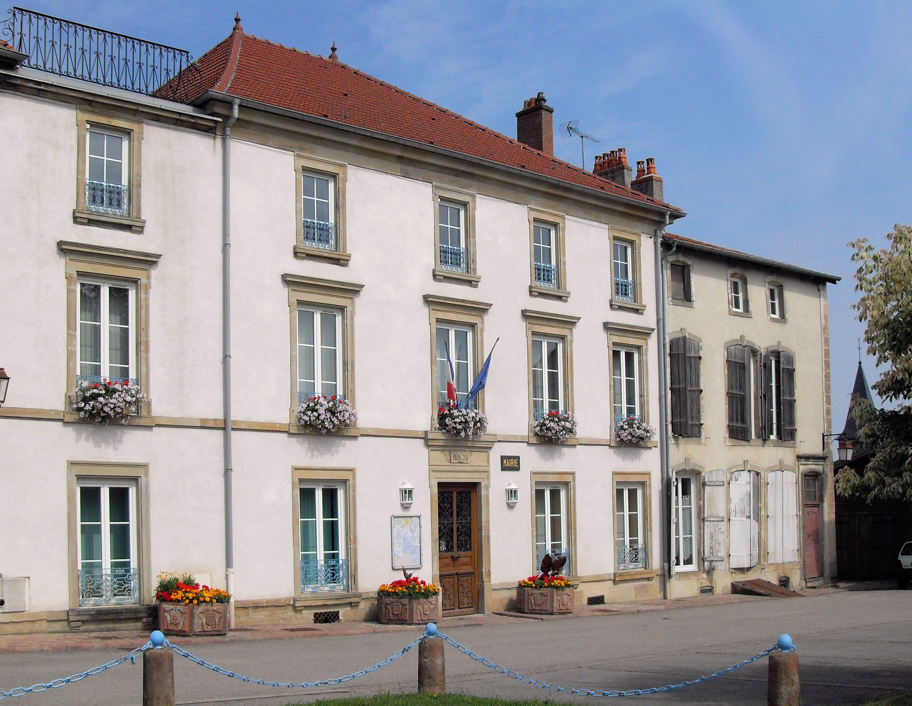 La mairie de Poussay